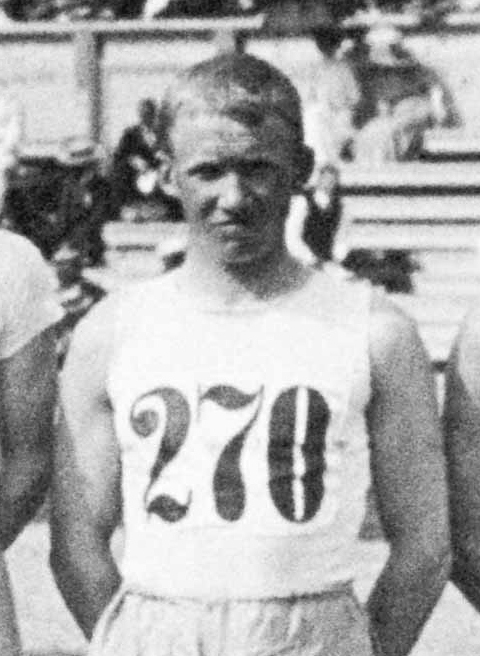 Johan Sundkvist, Stockholm Olympics